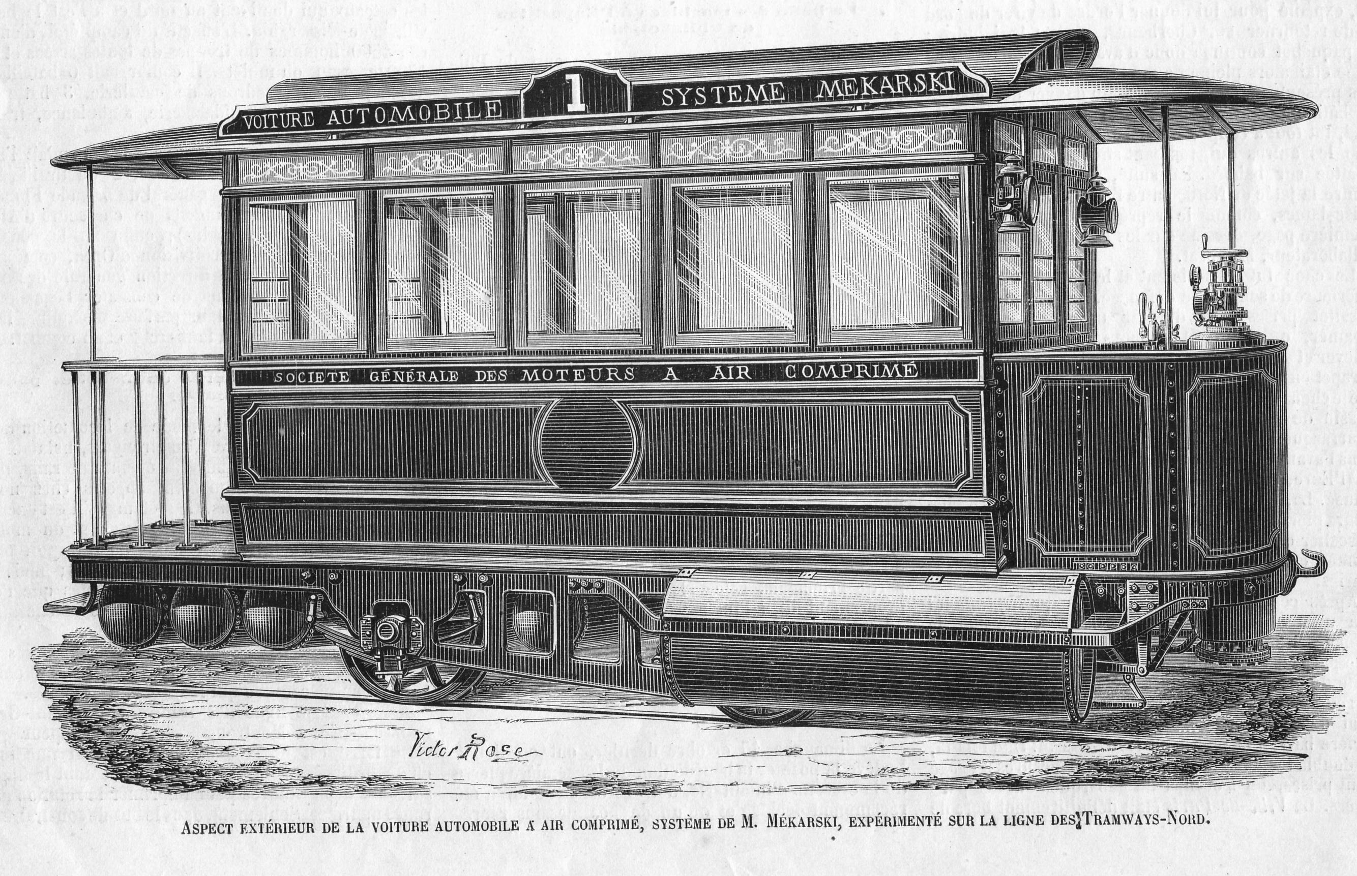 Extrait du journal l'Illustration, n°1708, page 332 du 20 novembre 1875Gravure signé Victor Rose : Aspect extérieur de la voiture automobile à air comprimé, système de M. Mékarski, expérimenté sur la ligne des Tramways Nord